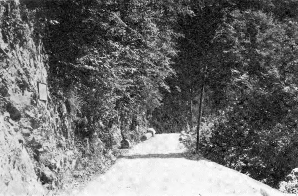 Spominska plošča na kraju, kjer je bil Janko Premrl-Vojko v boju smrtno ranjen